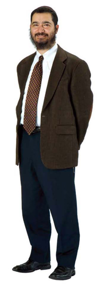 Shimon Waronker